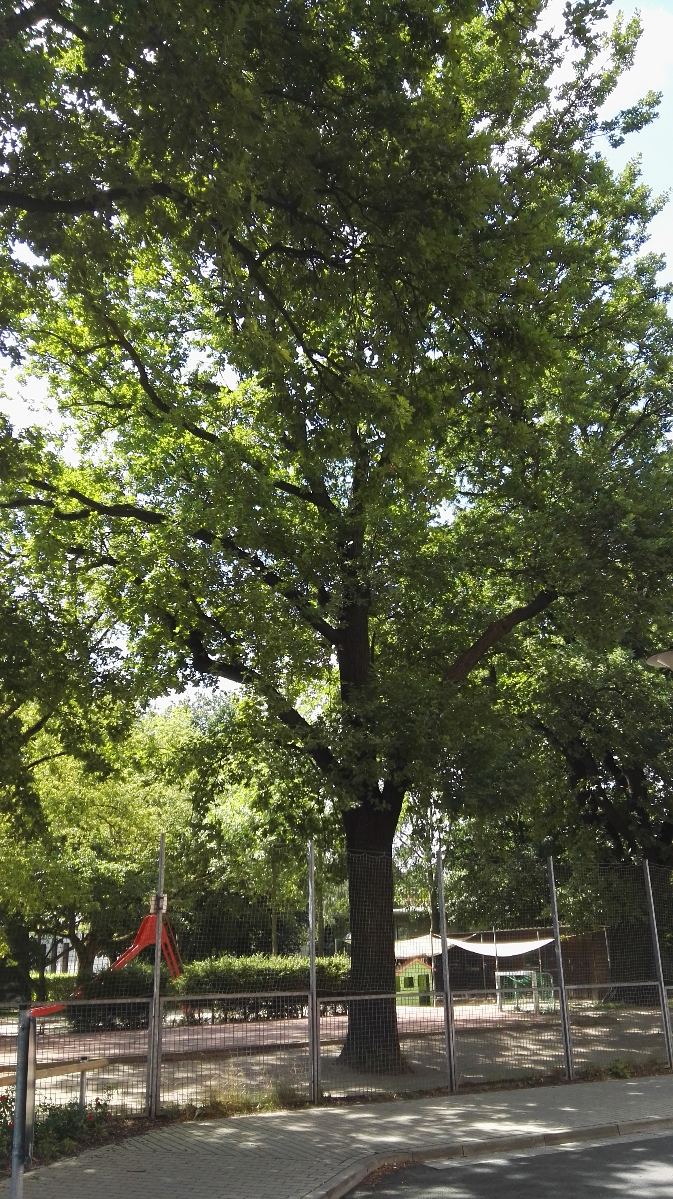 Naturdenkmal in Senftenberg Nr. 0100-7; Stieleiche (Quercus robur) im Garten des Kindergartens Glück-Auf-Straße, zirka 10 Meter nordwestlich vom Gebäude; Teil der Baumreihe aus Eichen 0100-5 bis 0100-9